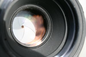 Vue du diaphragme fermé d'un objectif photo photo jean-Daniel Dodin 20051015